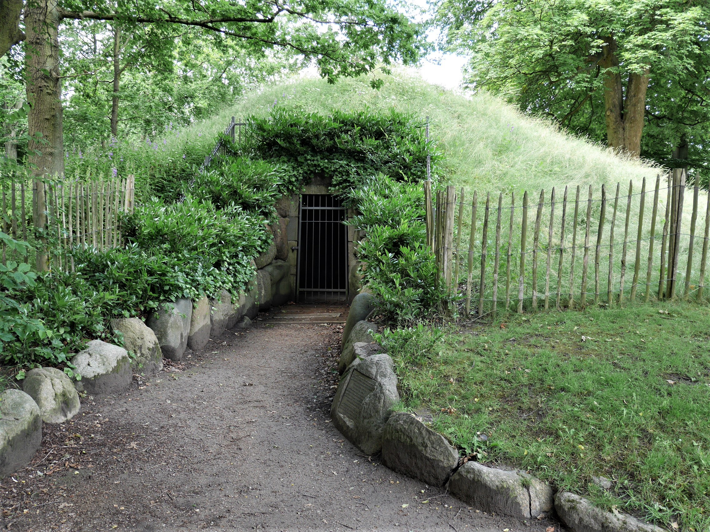 Mindehøjen i Søndermarken med kig ind til mindesmærket i højen